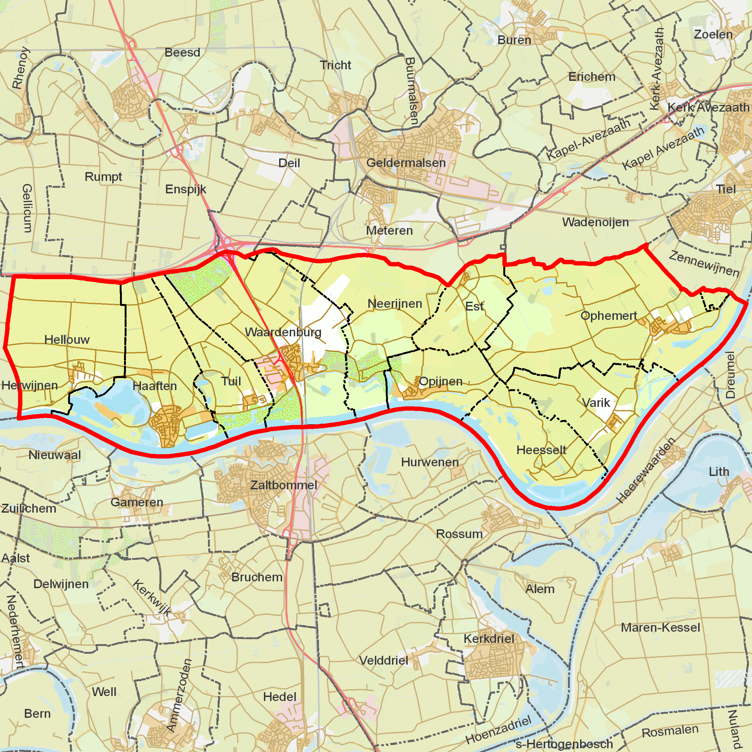 BAG woonplaatsen - Gemeente Neerijnen.png